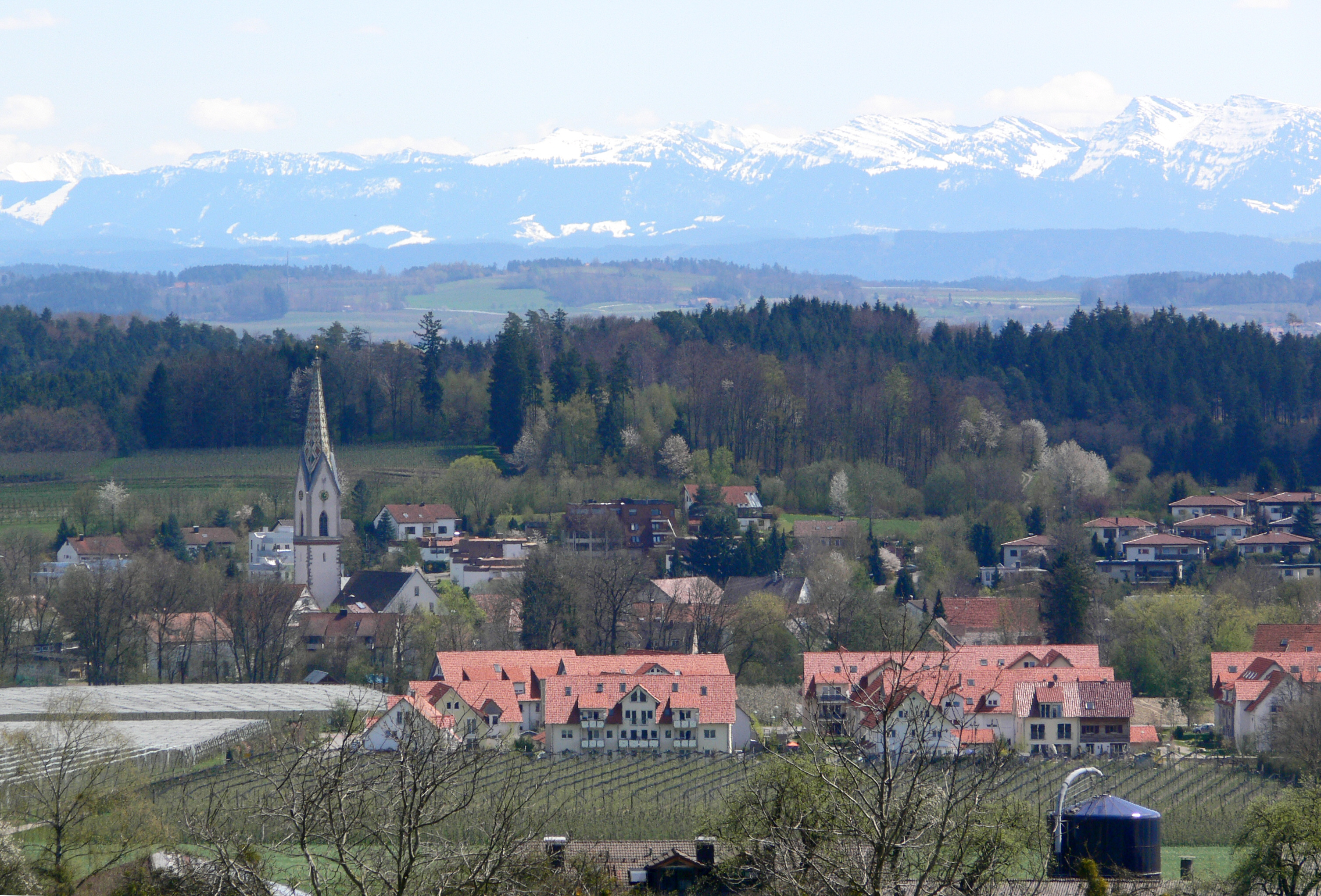 Oberteuringen, Bodenseekreis, Baden-Württemberg Blick von einer Anhöhe über Bitzenhofen auf Oberteuringen (bei Föhnwetterlage mit Alpenpanorama)